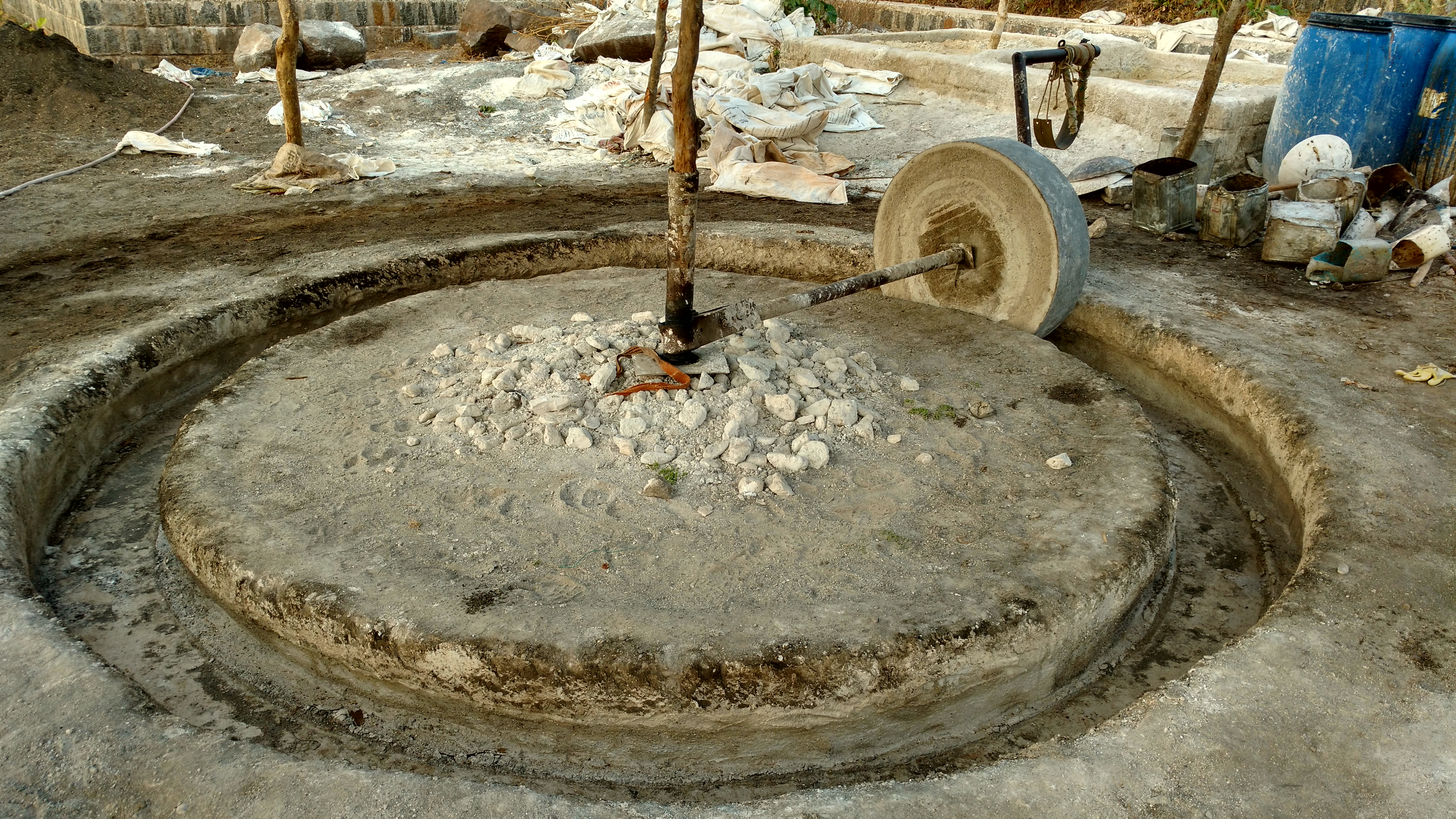 Lime mortar mixer on Rasalgad